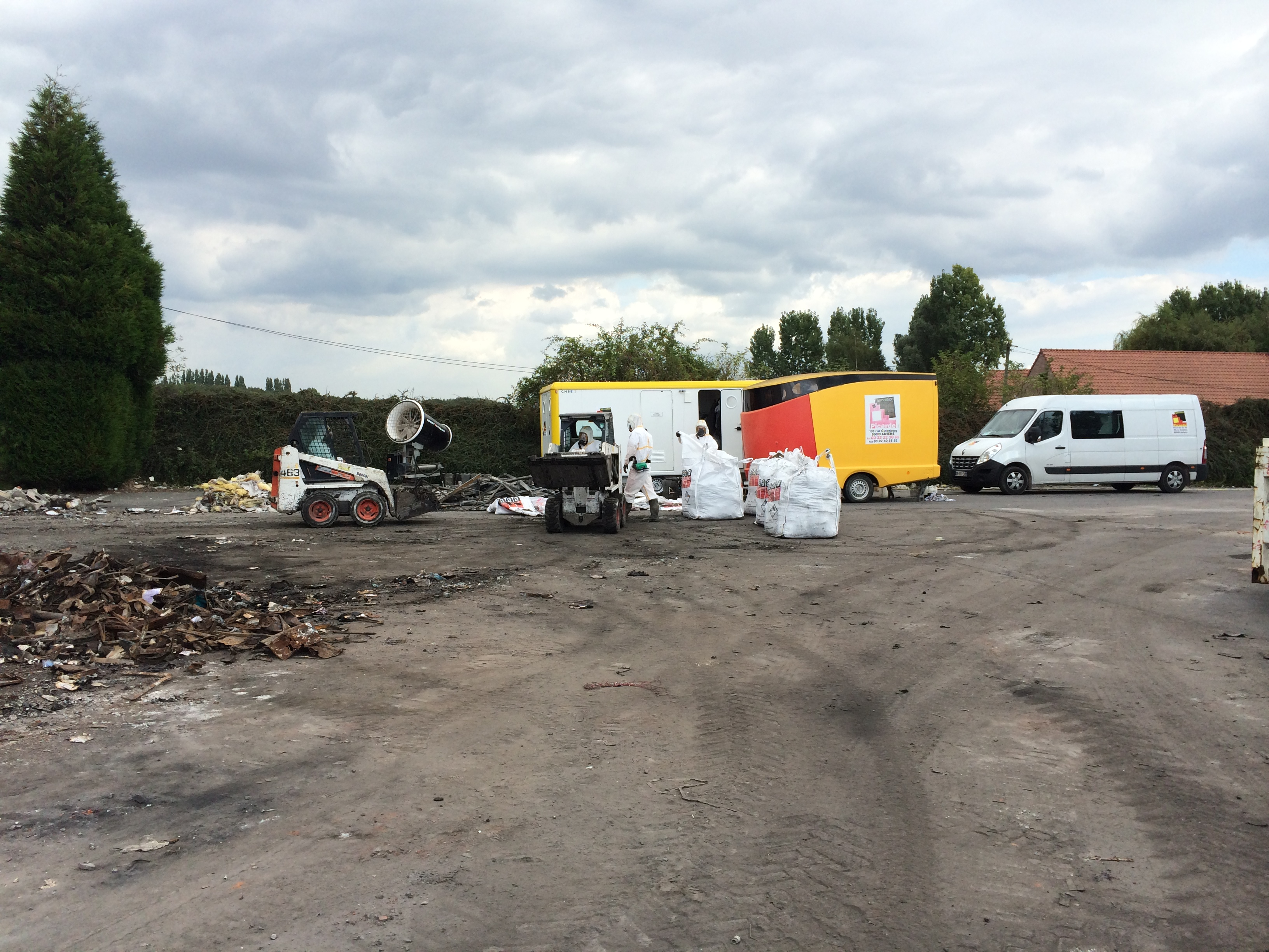 Site de désamiantage